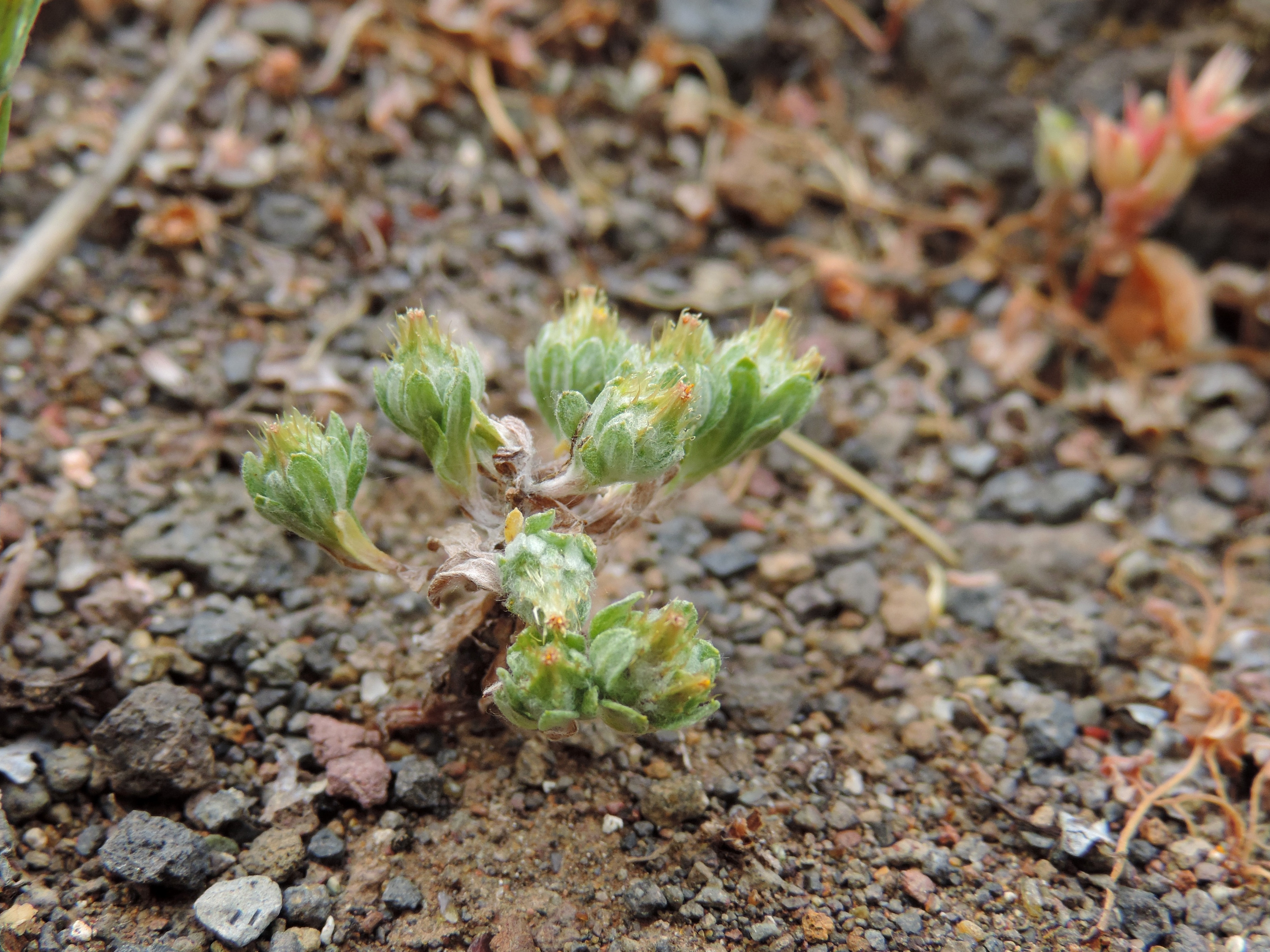 Filago pyramidata in Barranco de Guayadeque, Gran Canaria